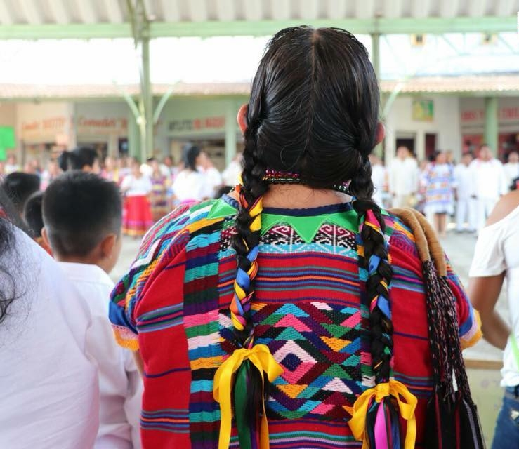 Vestimenta Mazateca This photo has been taken in the country: Mexico